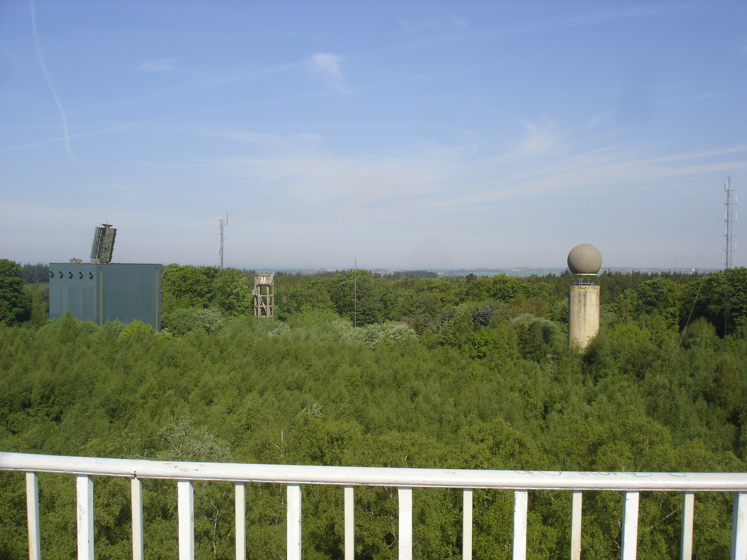 Antenner i Almindingen, set fra Kongemindet på Rytterknægten